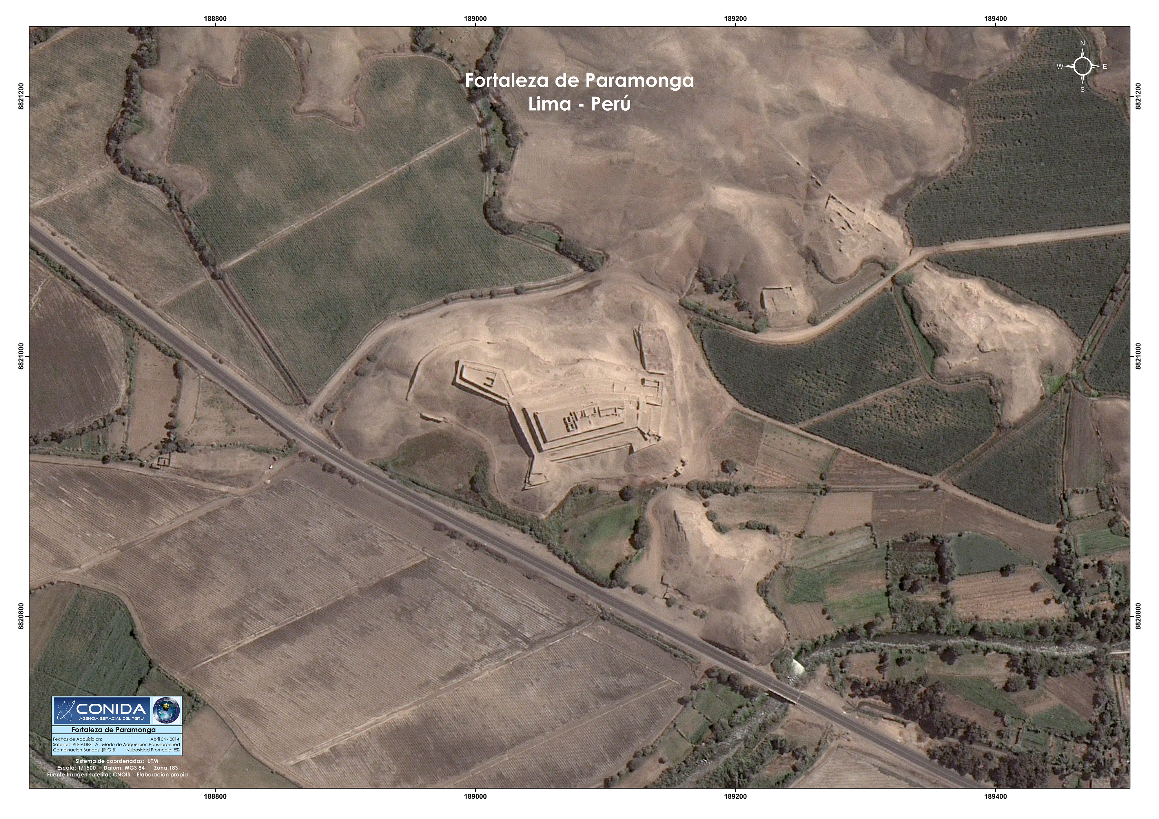 Vista aérea de Paramonga, por el sat{elite PerúSat-1.